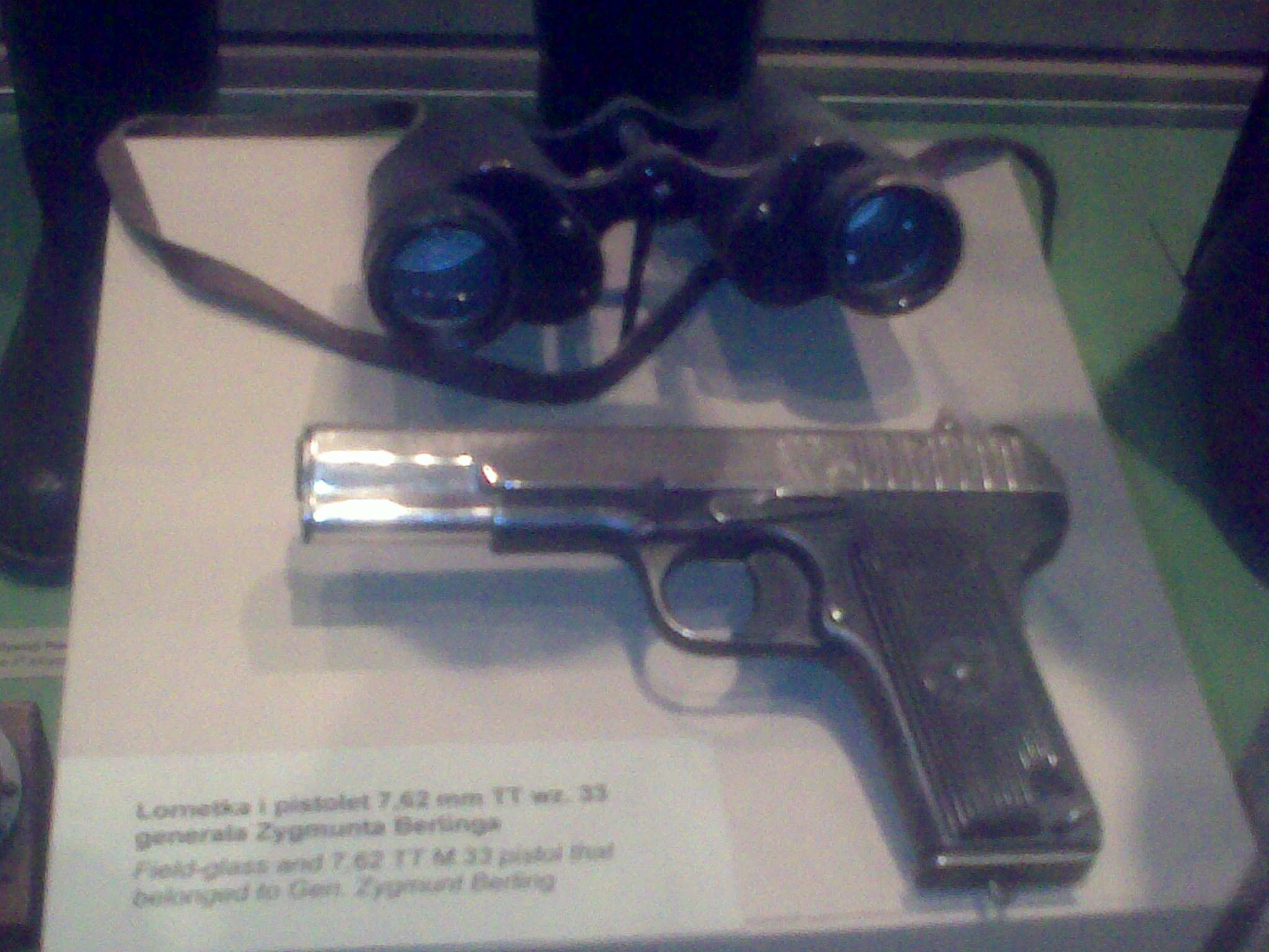 Pistolet TT i lornetka należące do gen. Zygmunta Berlinga, ze zbiorów Muzeum Wojska Polskiego w Warszawie